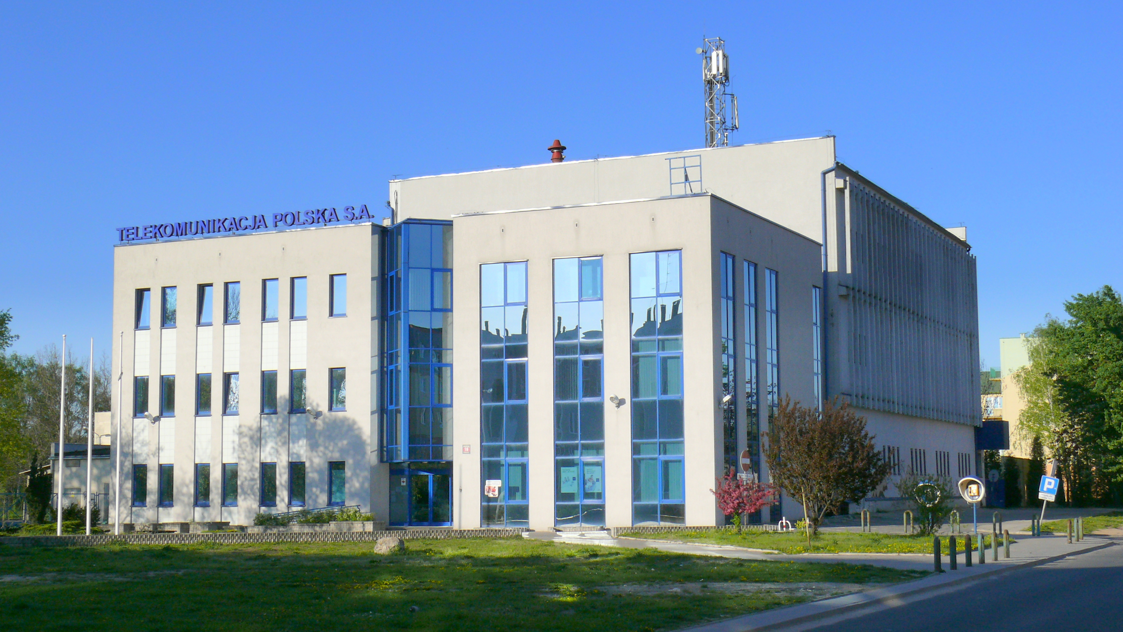 Telekomunikacja Polska, Łódź-Północ ul. Okoniowaa 16 w Łodzi